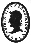 logo serii wydawniczej "Bibljoteka Laureatów Nobla"